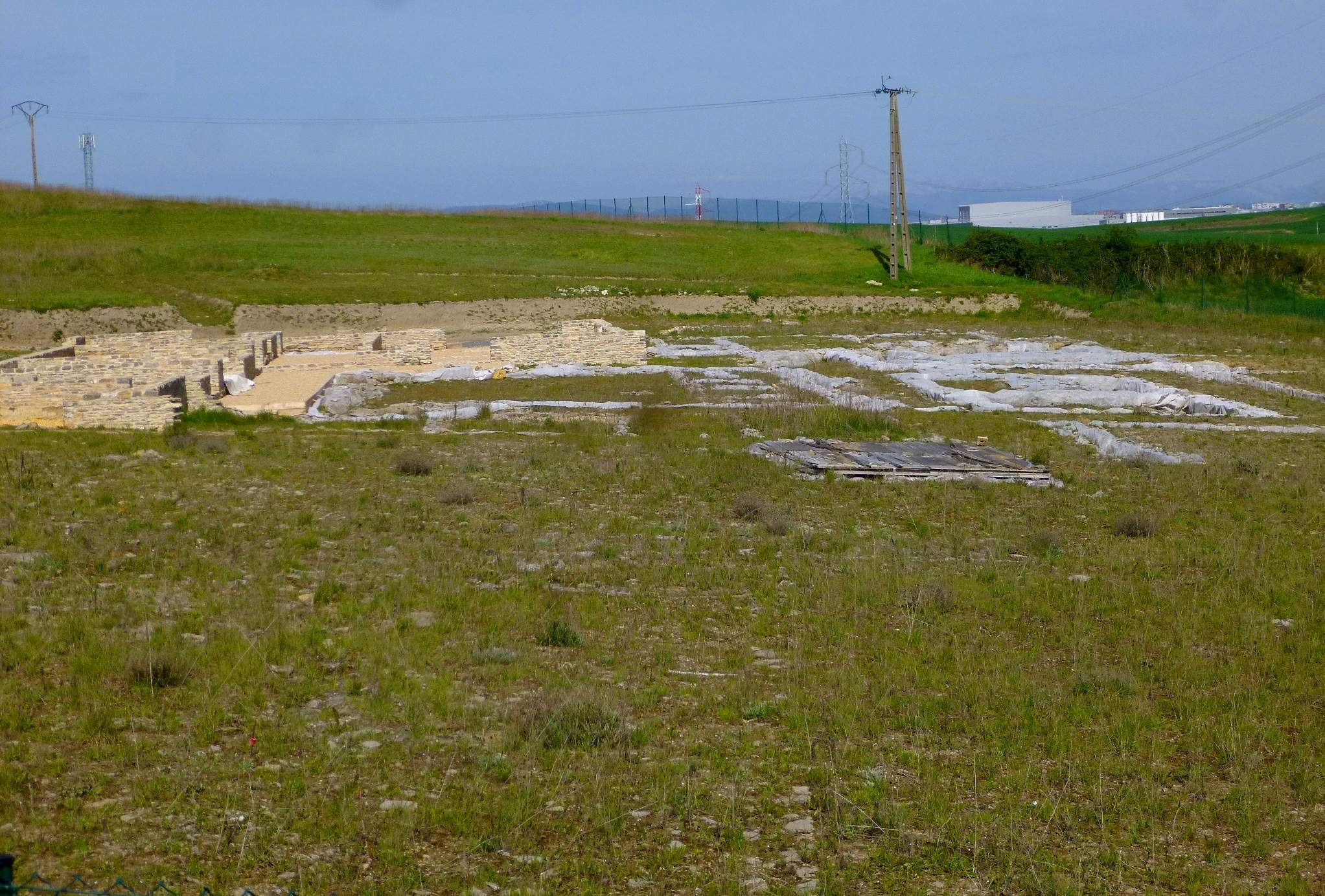 Yacimiento del oppidum romano de Iruña-Veleia (Álava)